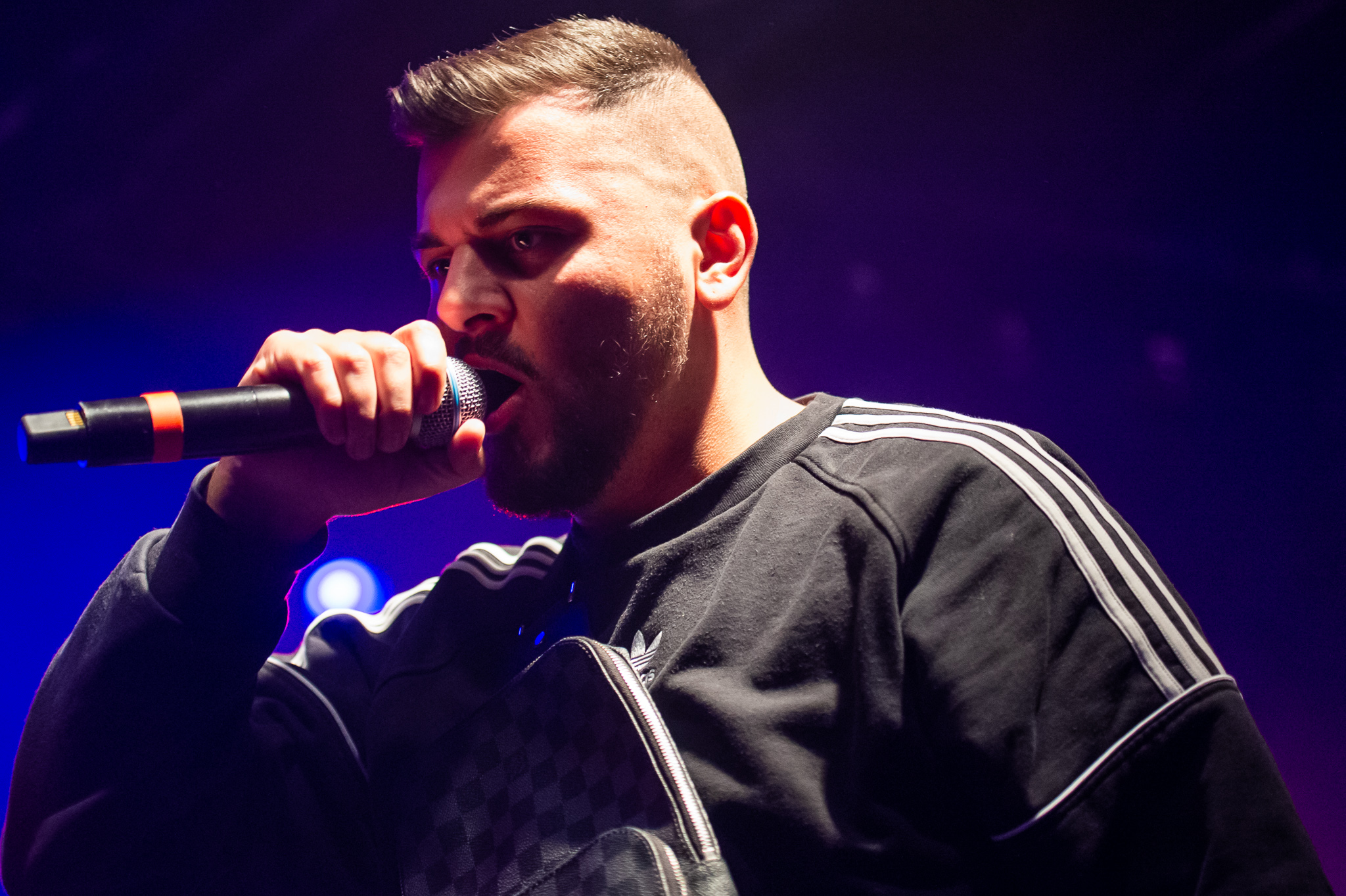 Concertbüro Franken,Der Hirsch,Juri,Juri Abdul,Konzert,Livekonzert,Livemusik,Musik